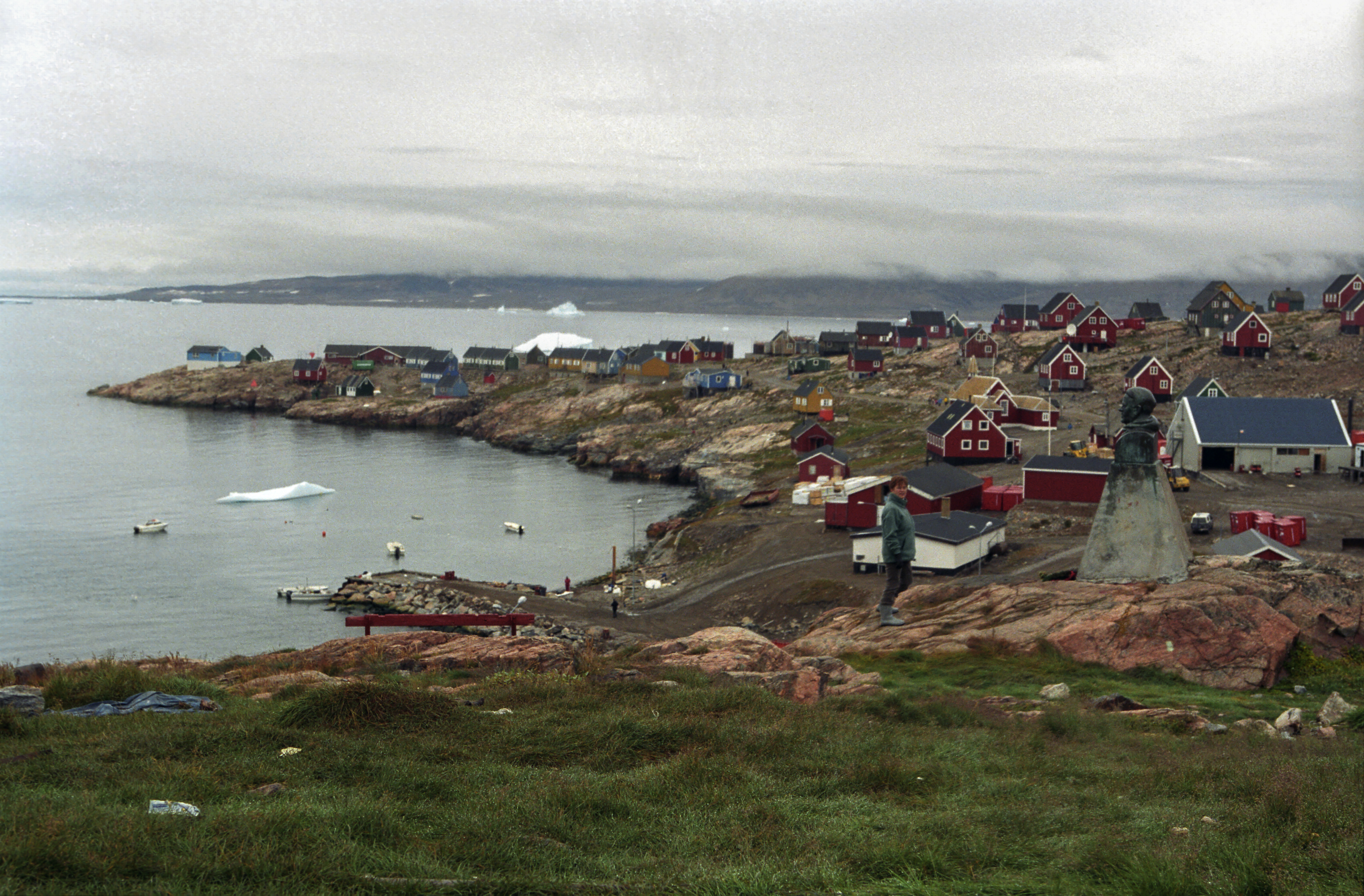 Ittoqqortoormiit. Na pierwszym planie popiersie Ejnara Mikkelsena